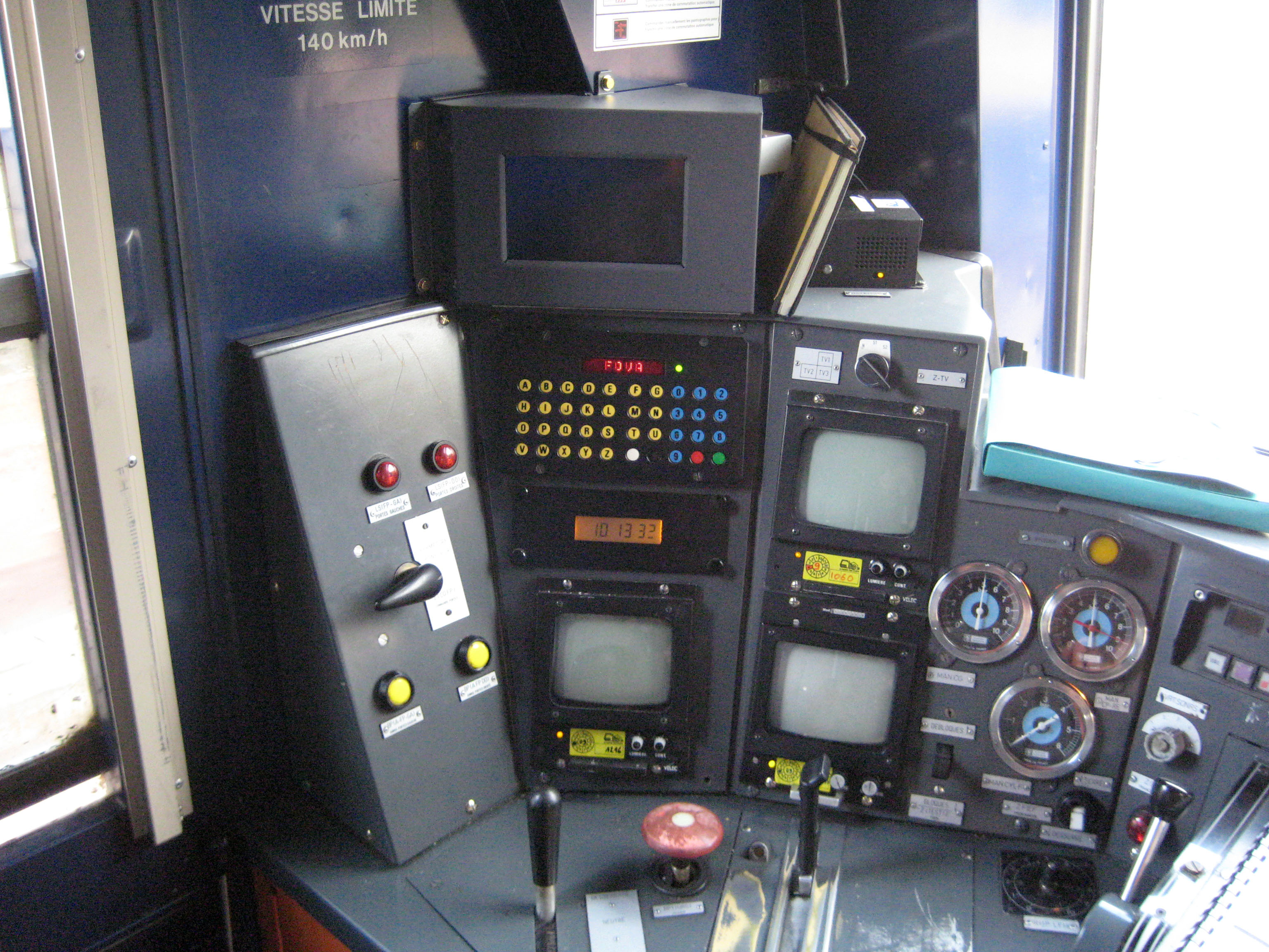 Système d’information voyageurs embarqué (petit écran gris au dessus de l'afficheur des codes missions)